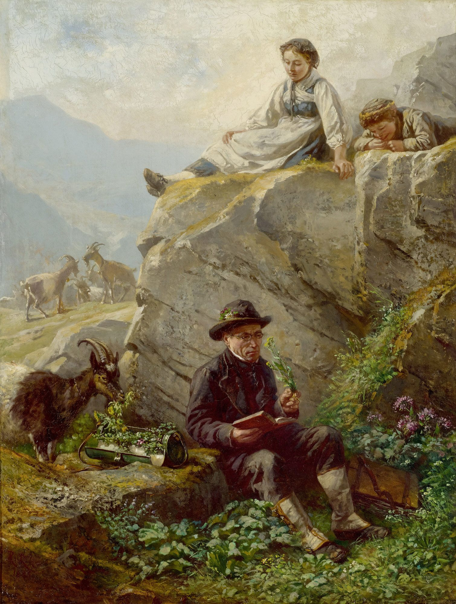 Der Botaniker. Öl auf Leinwand. Unten links signiert und datiert: R. Ritz. 1883. 66,7 x 50,8 cm.